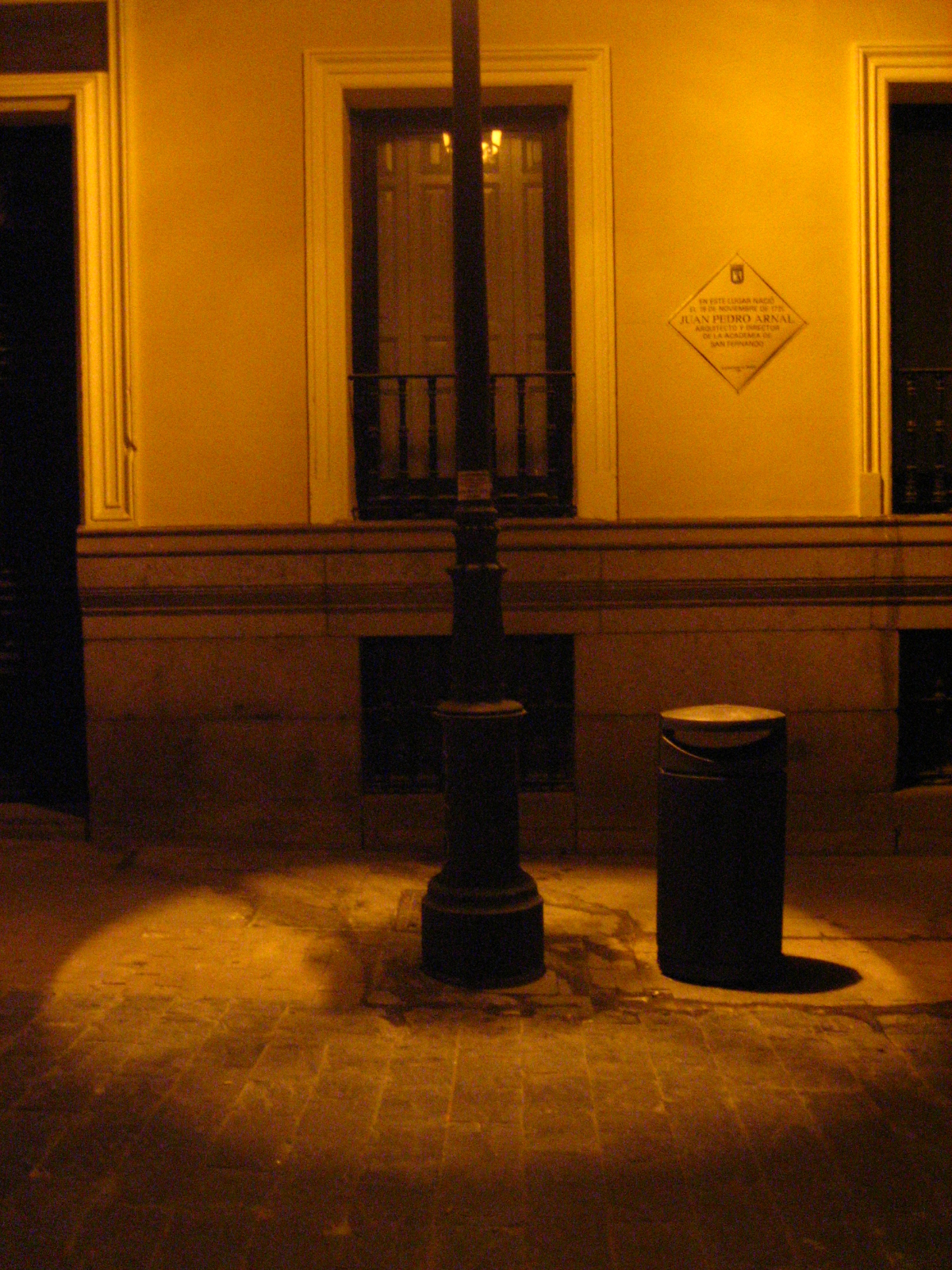 Farola en Madrid en la casa antal de Juan Pedro Arnal